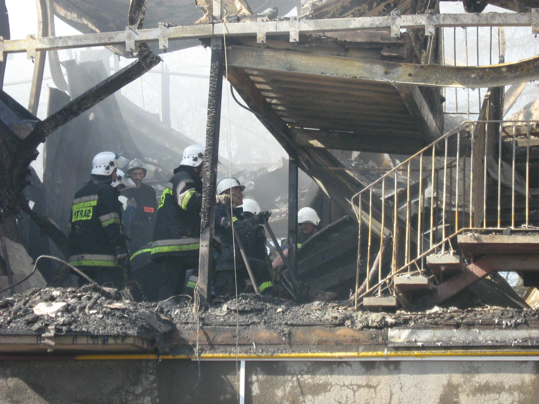 Pożar hotelu socjalnego w Kamieniu Pomorskim